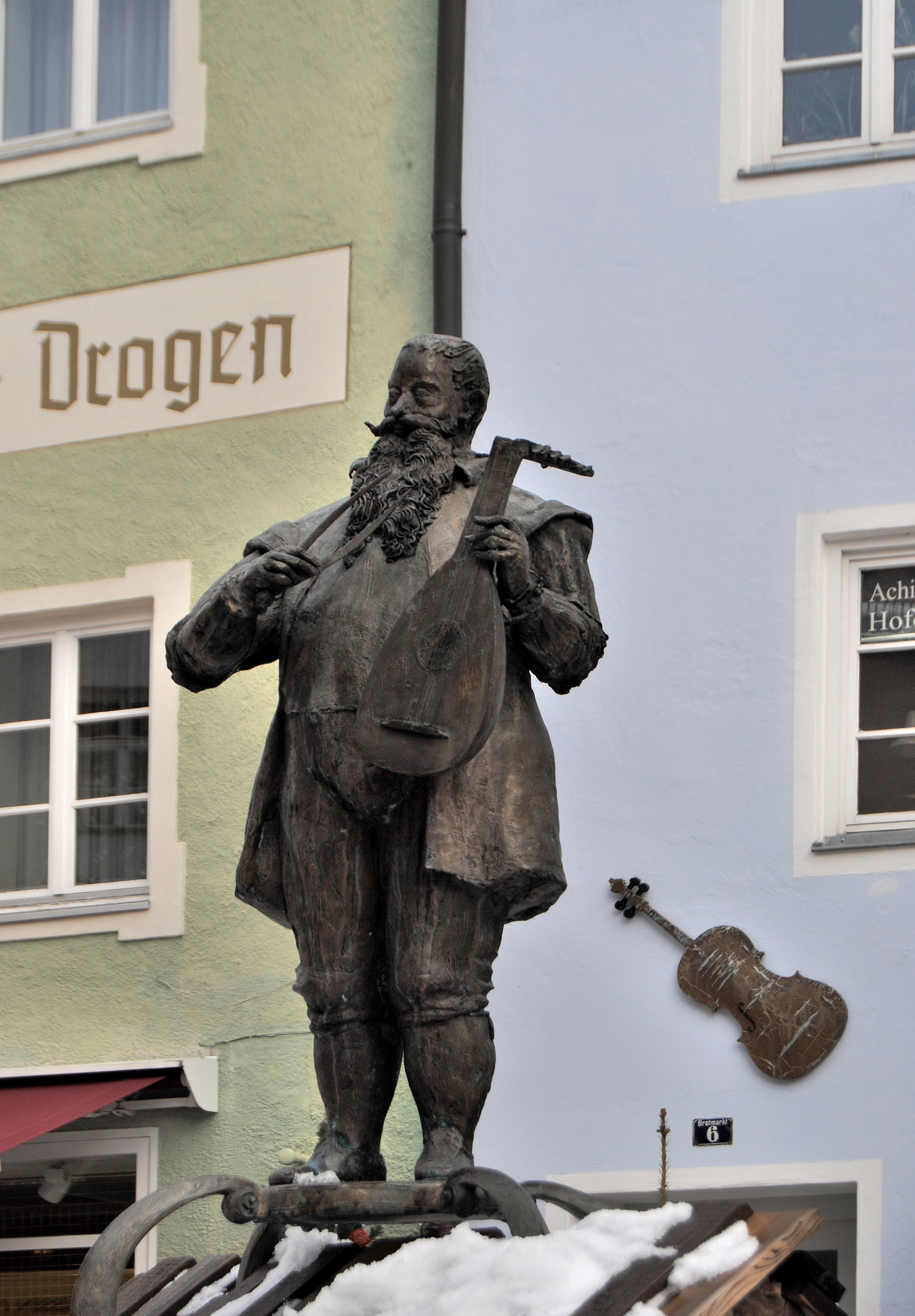 Die Brunnensäule, die Caspar Tieffenbrucker (1514–1571, bedeutender Lautenmacher) zeigt, auf dem Lautenmacherbrunnen (Brotmarkt) in der Altstadt der bayrischen Stadt Füssen, Ostallgäu.